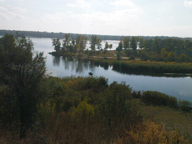 Затока